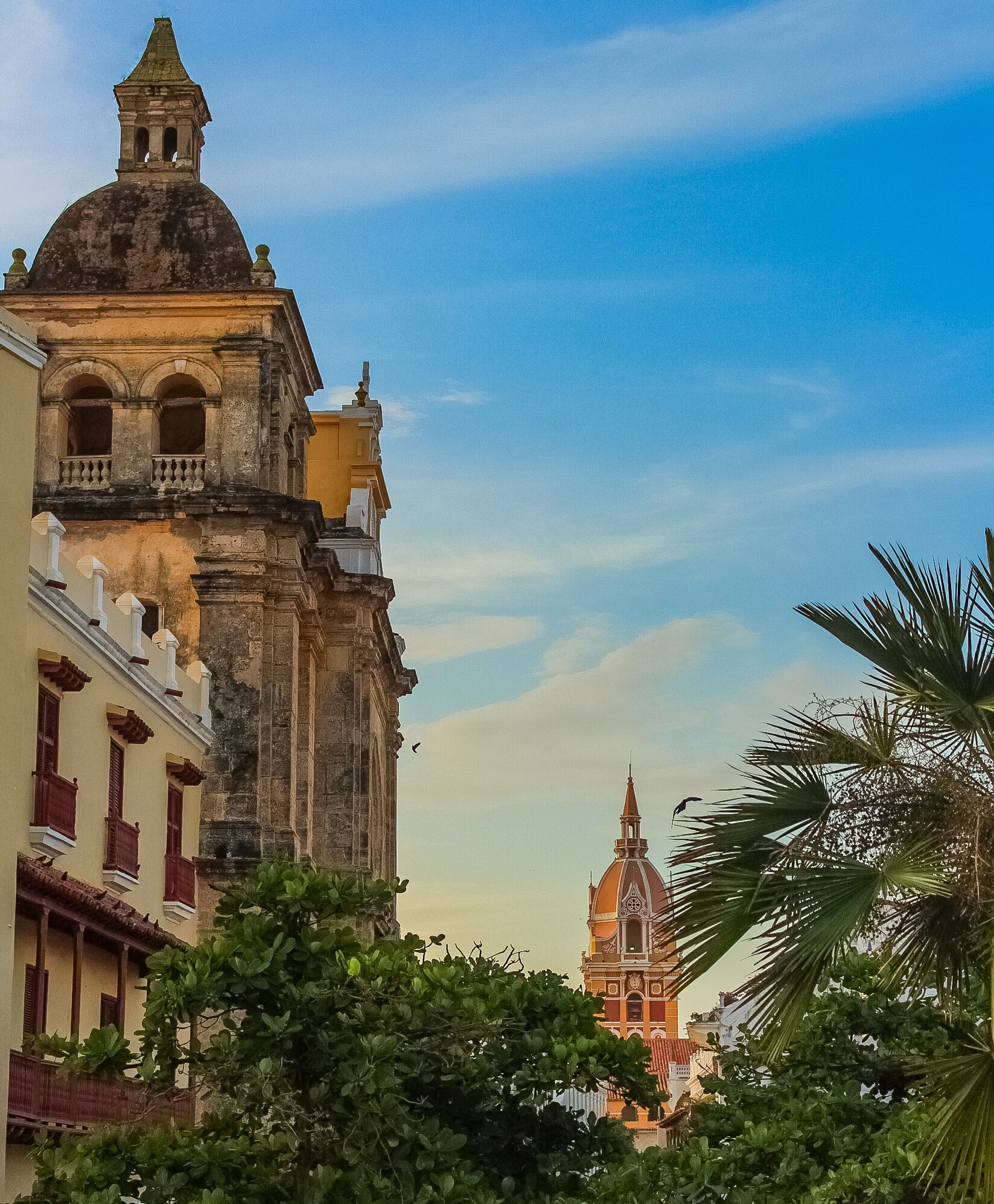 Centro histórico de Cartagena, Colombia. Por: @f.o.g.photography